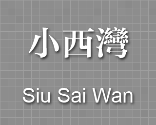 粵語: Siu Sai Wan sta